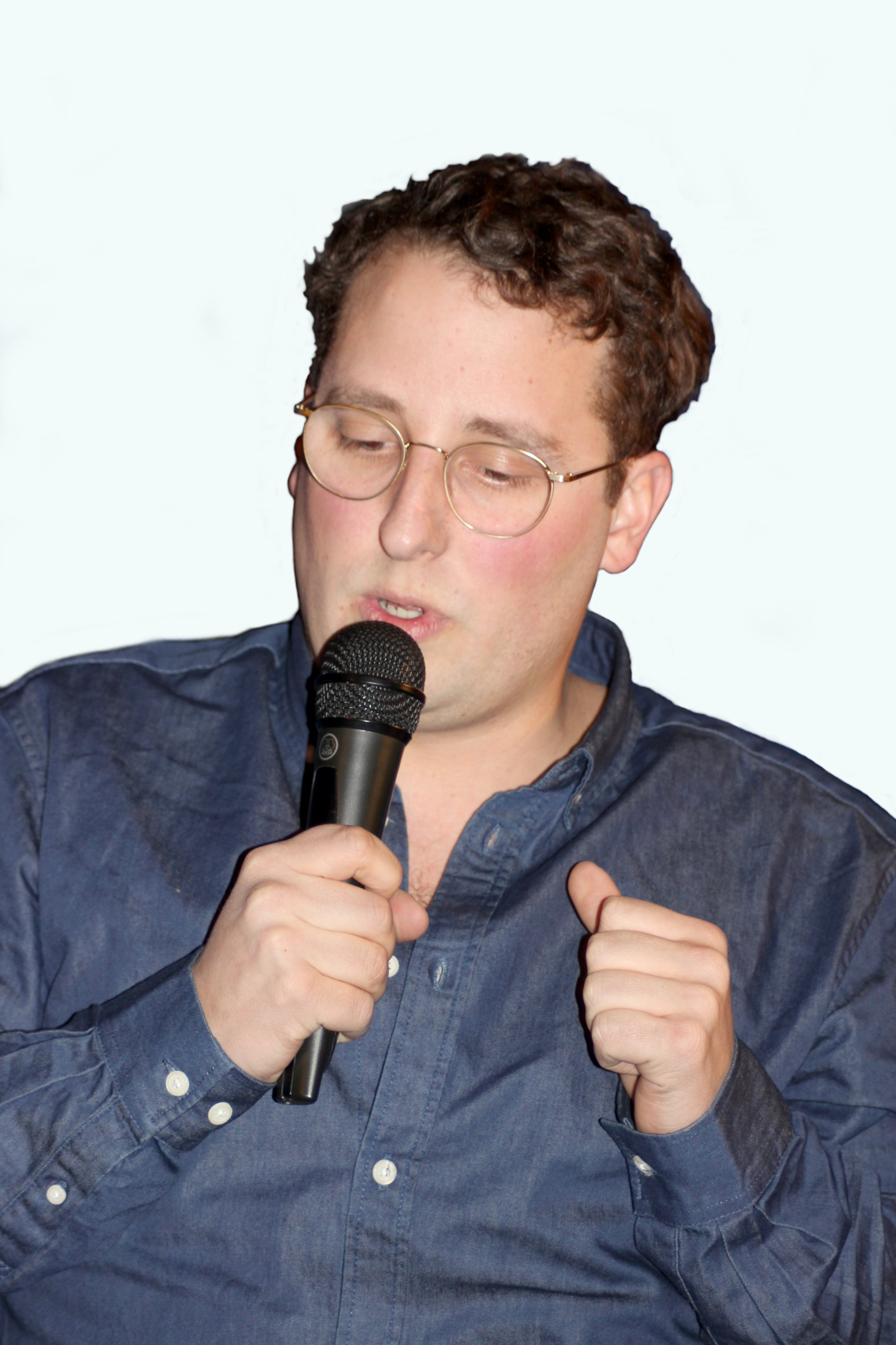 Der deutsche Theater- und Filmschauspieler Bastian Reiber ist in Mönchengladbach geboren. Er studierte von 2005 bis 2009 Schauspiel an der Hochschule für Musik und Theater „Felix Mendelssohn Bartholdy“ in Leipzig. Aufnahme von 2019.